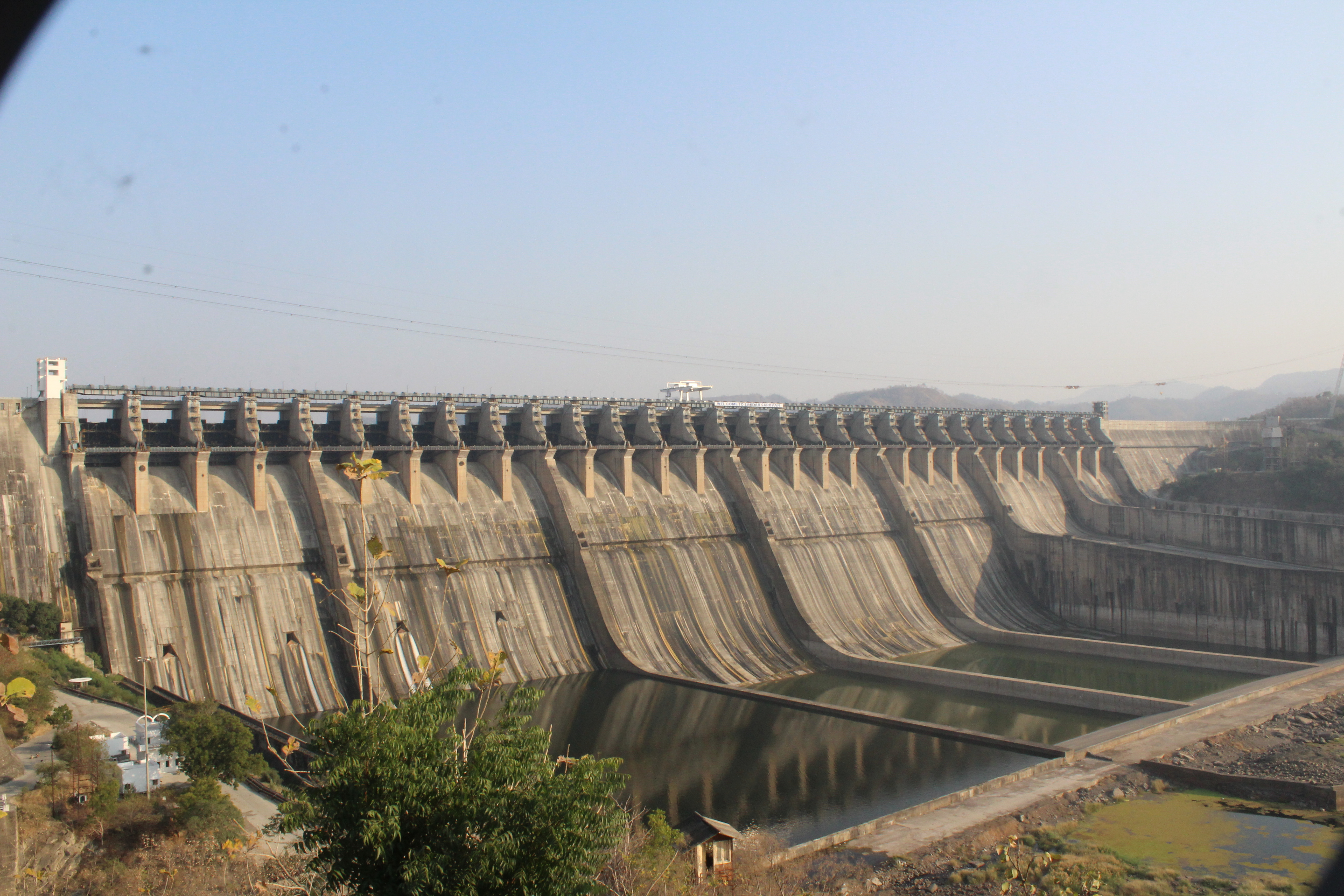 sardar sarovar dam on the river narmada, Gujarat